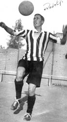 Bruno Rodolfi en Gimnasia y Esgrima (Mendoza). Ídolo de fines de 1920 y principios de 1930.